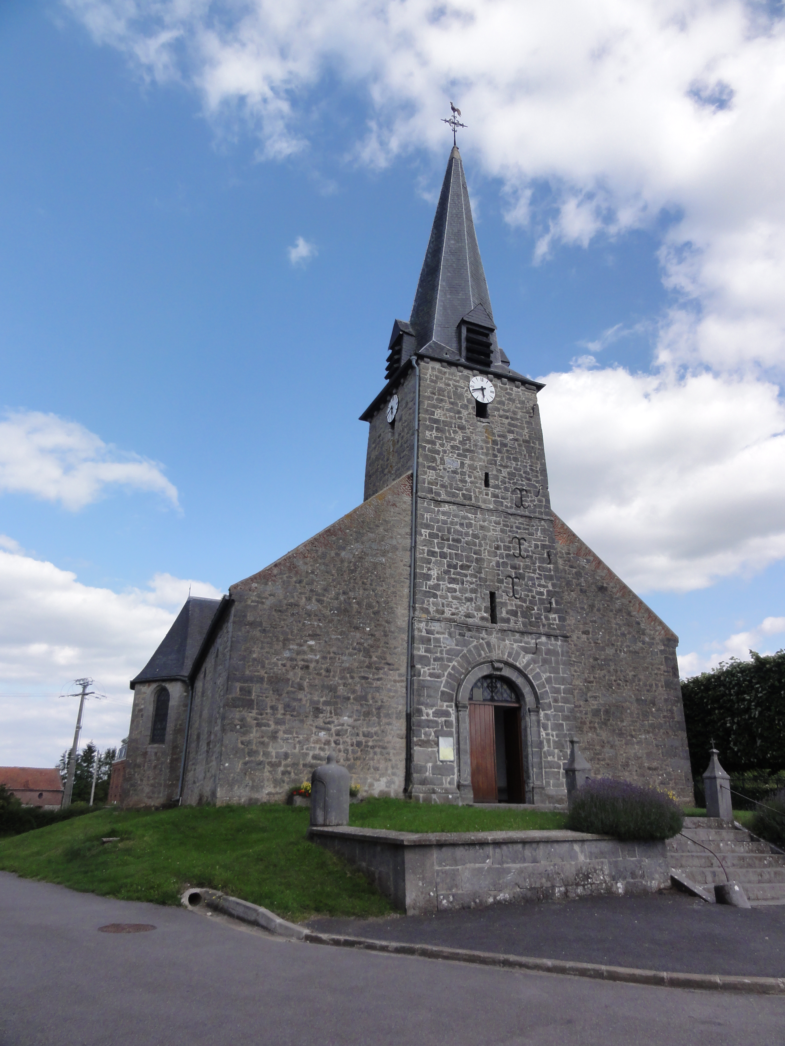 Marbaix (Nord, Fr) église